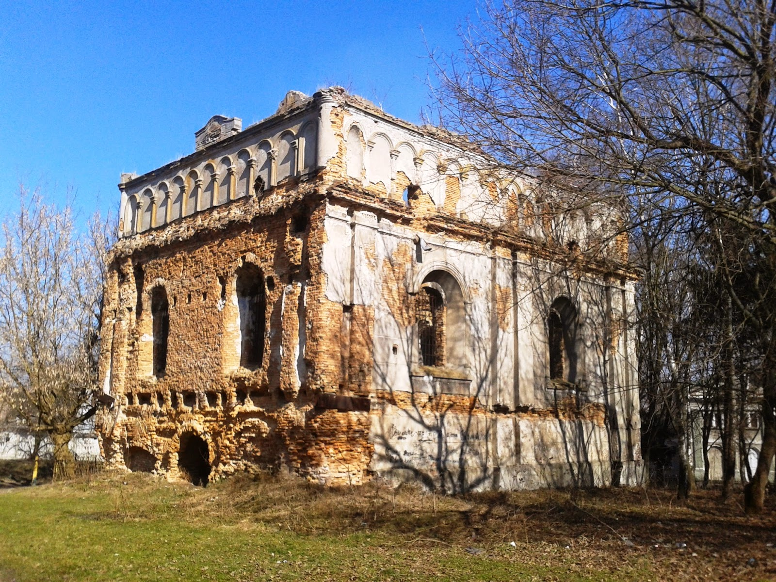 Стара Синагога, Сокаль, Сокальський район Львівська область